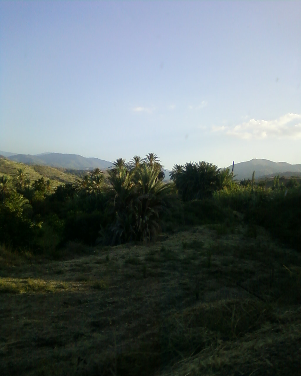 Lefke yakınlarında, hurma/palmiye ağaçlarının ön planda olduğu, ünlü bir manzara.